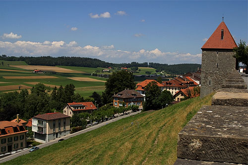 Romont (FR) - Tour du Sauvage